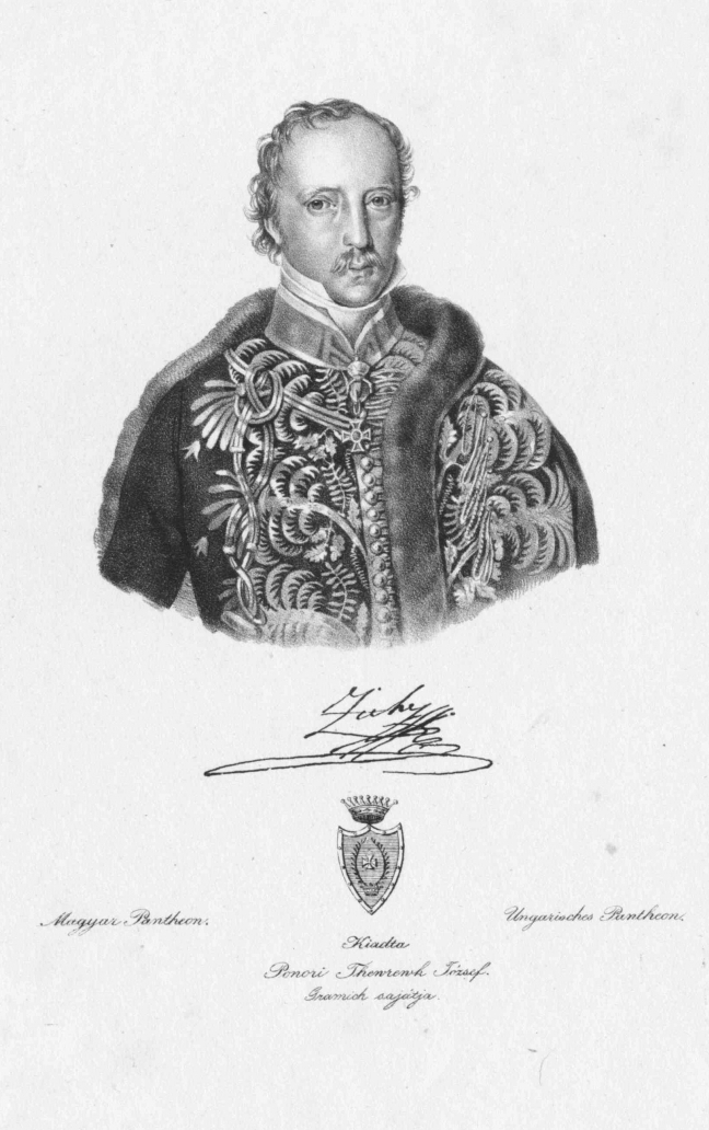 Gróf zicsi és vázsonykői Zichy Ferenc Szerafin József (Pozsony, 1774. szeptember 20. – Pozsony, 1861. augusztus 15.) főispán, valóságos belső titkos tanácsos.